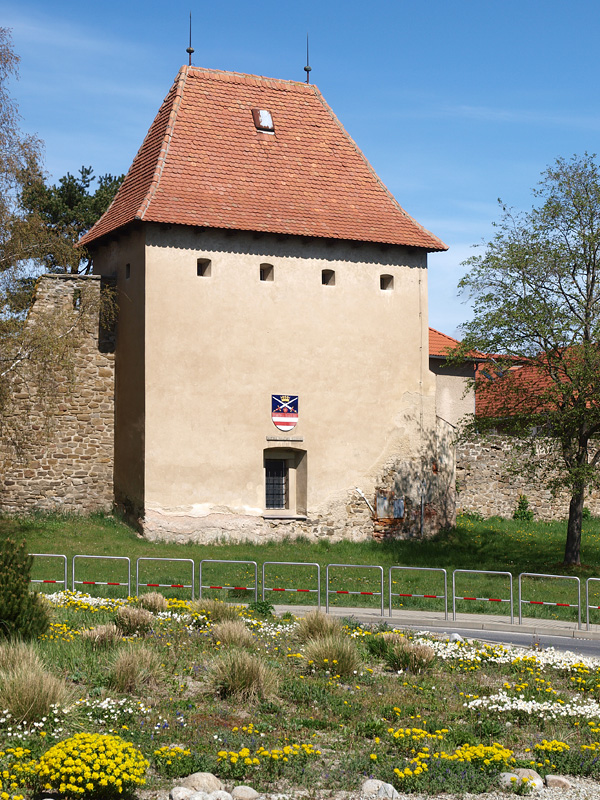 Kežmarok - Obranná bašta